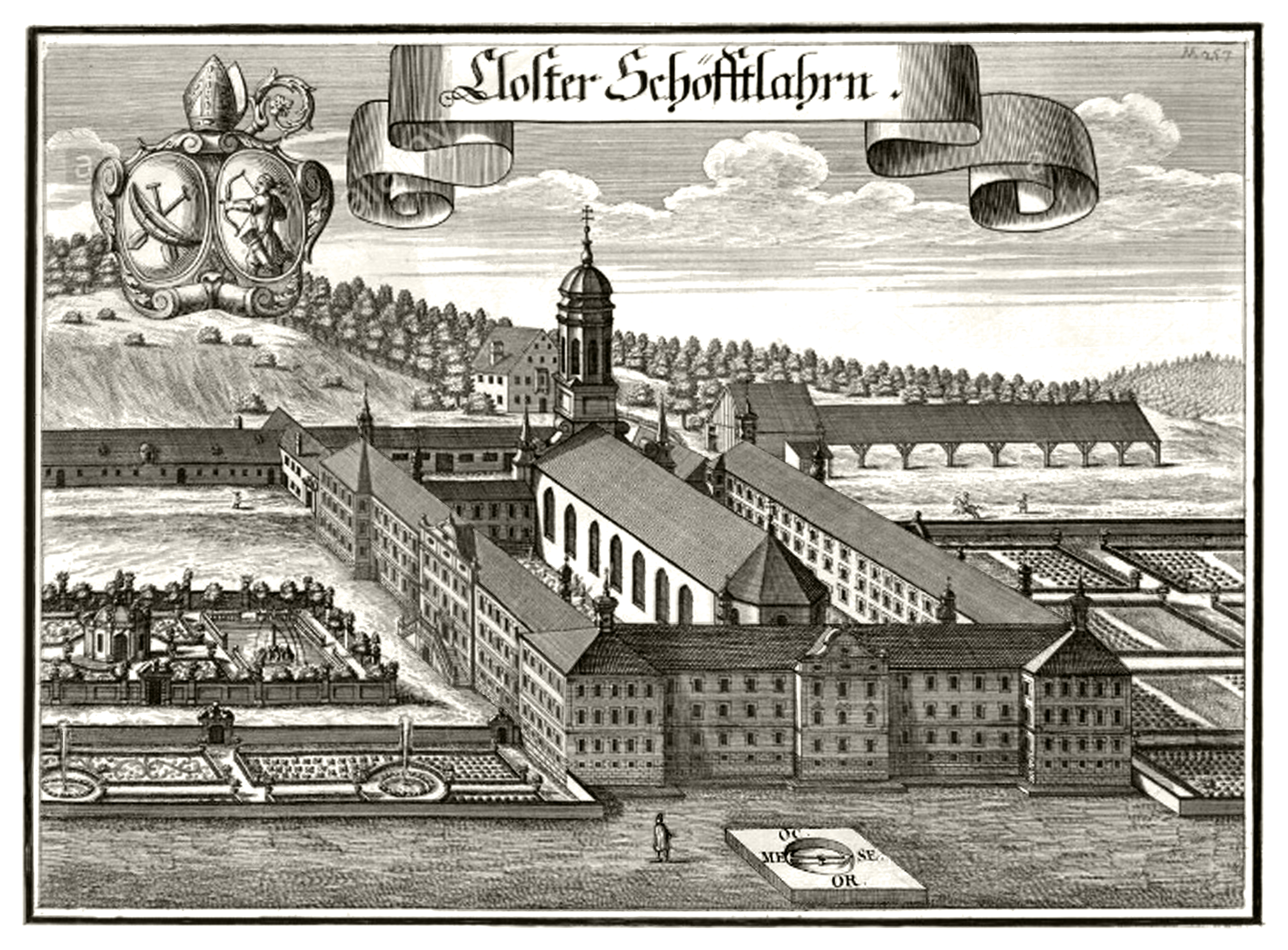 Michael Wening: Kloster Schäftlarn im Isartal. Der Neubau der Klostergebäude um die gotische Klosterkirche wurde zwischen 1702 bis 1707 errichtet. Wenings Stich von 1701 zeigte daher zunächst nur das geplante Projekt, das in dieser Form auch verwirklicht wurde. Erst 1733 kam die alte Kirche zum Abbruch und wurde durch einen barocken Neubau ersetzt.